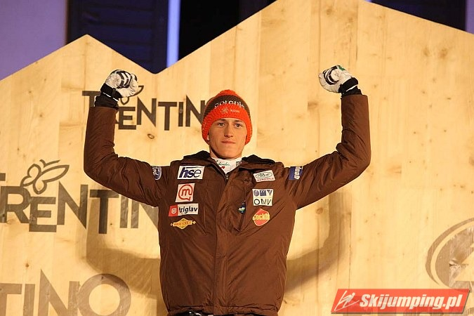 Dekoracja medalowa konkursu indywidualnego mężczyzn na skoczni K-120